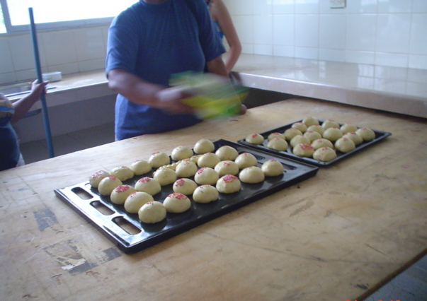 ZUMAR - Economía familiar - Curso de capacitación en panadería Autor: Equipo ZUMAR Fecha: 2005